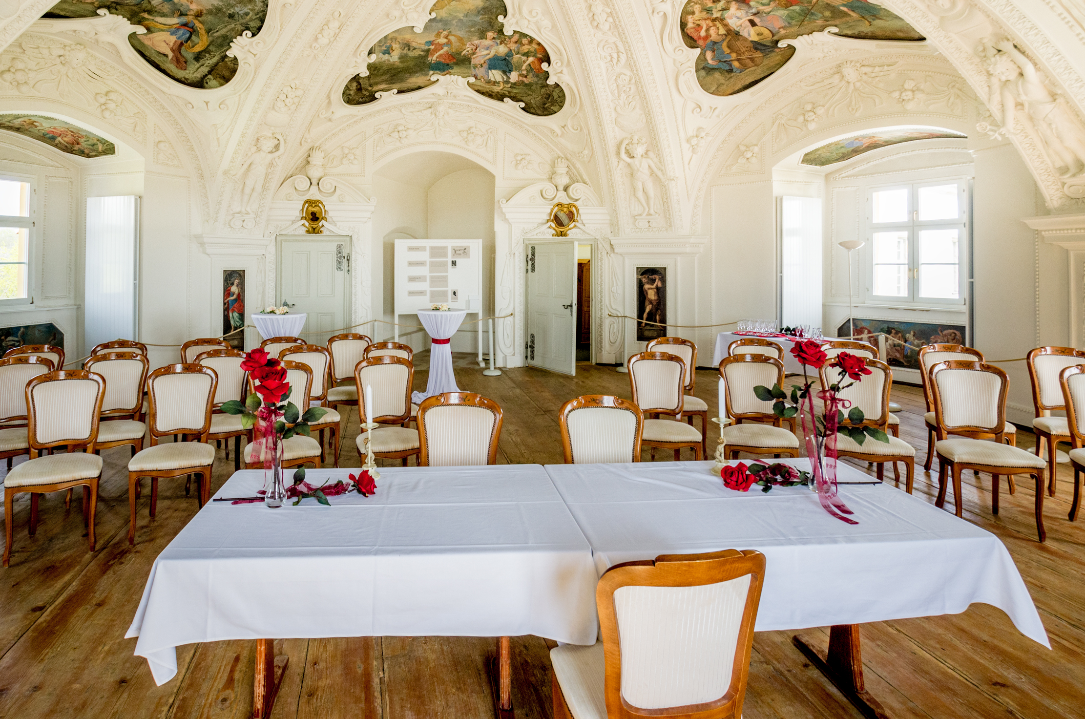 Wörth an der Donau. Schloss Wörth. Rondellzimmer im südwestlichen Batterieturm des Fürstenbaus. Ein Werk von Jakob Heybel aus den Jahren 1676 - 1678.